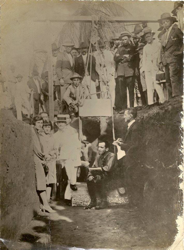 Pedra fundamental da Catedral de São Bento, 1928.